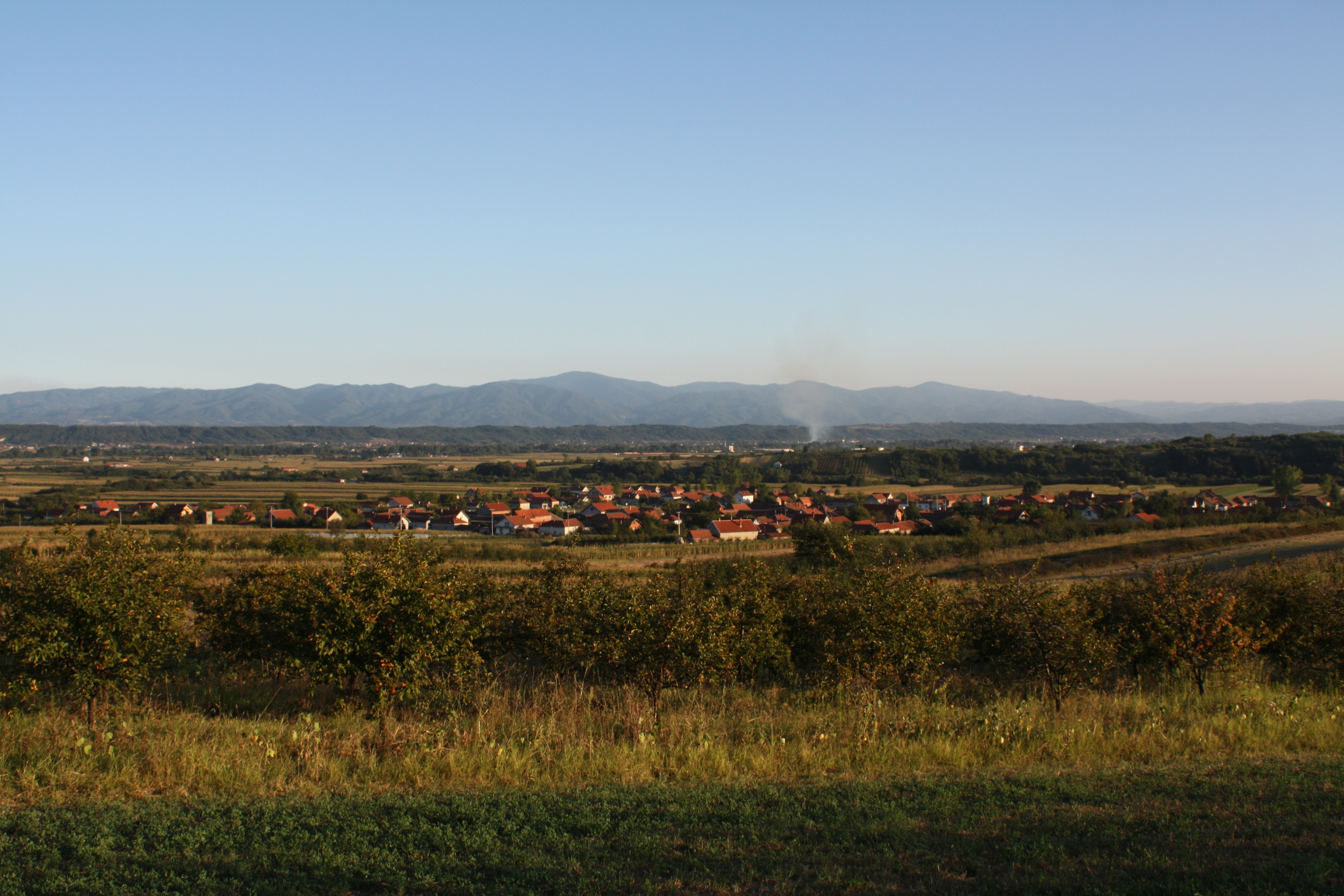 Selo Milanovo vidjeno sa brda prema Pasinoj cesmi.